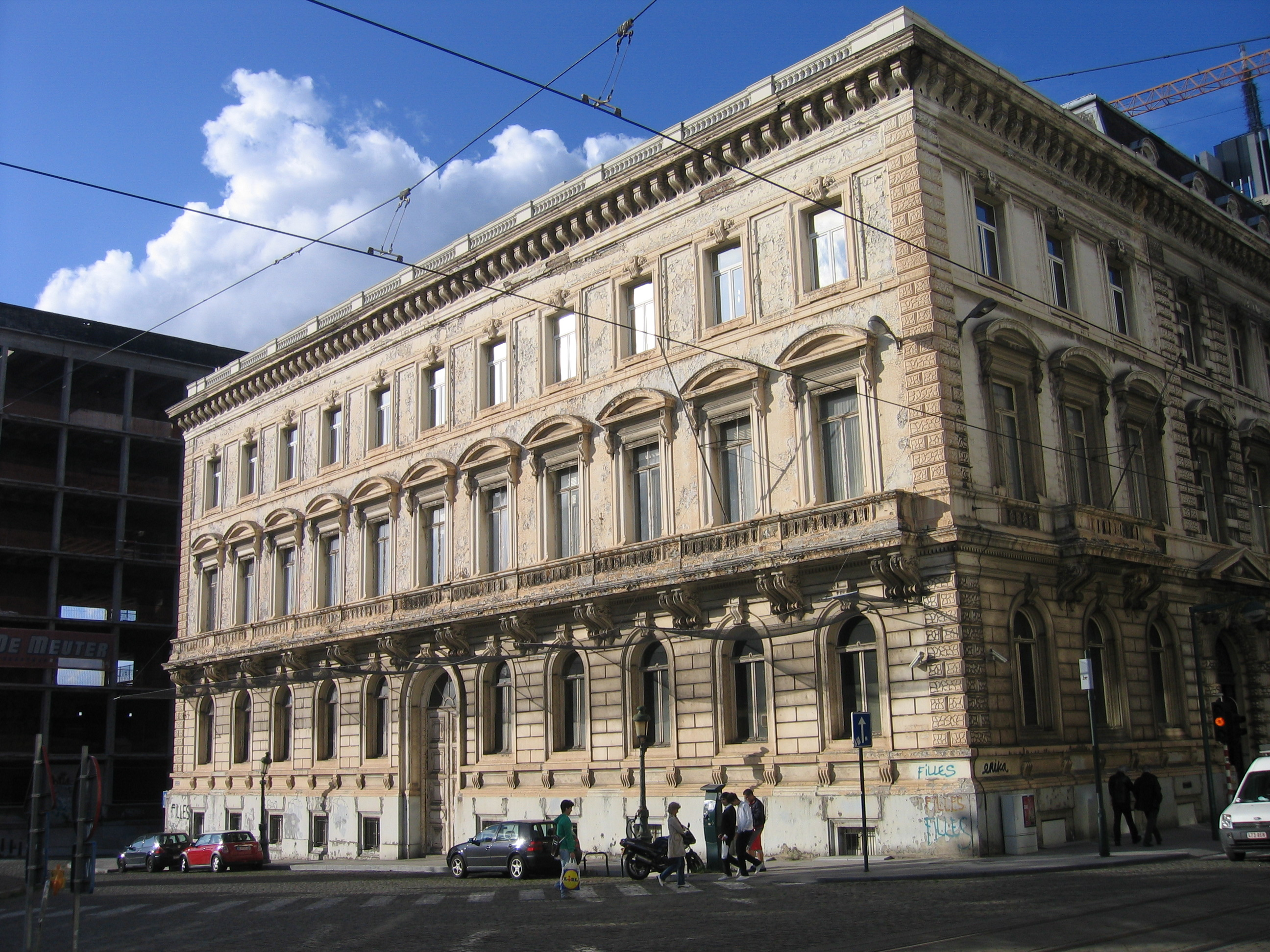 Gebouw Leverhouse aan het Congresplein 2, door architekt Joseph Poelaert